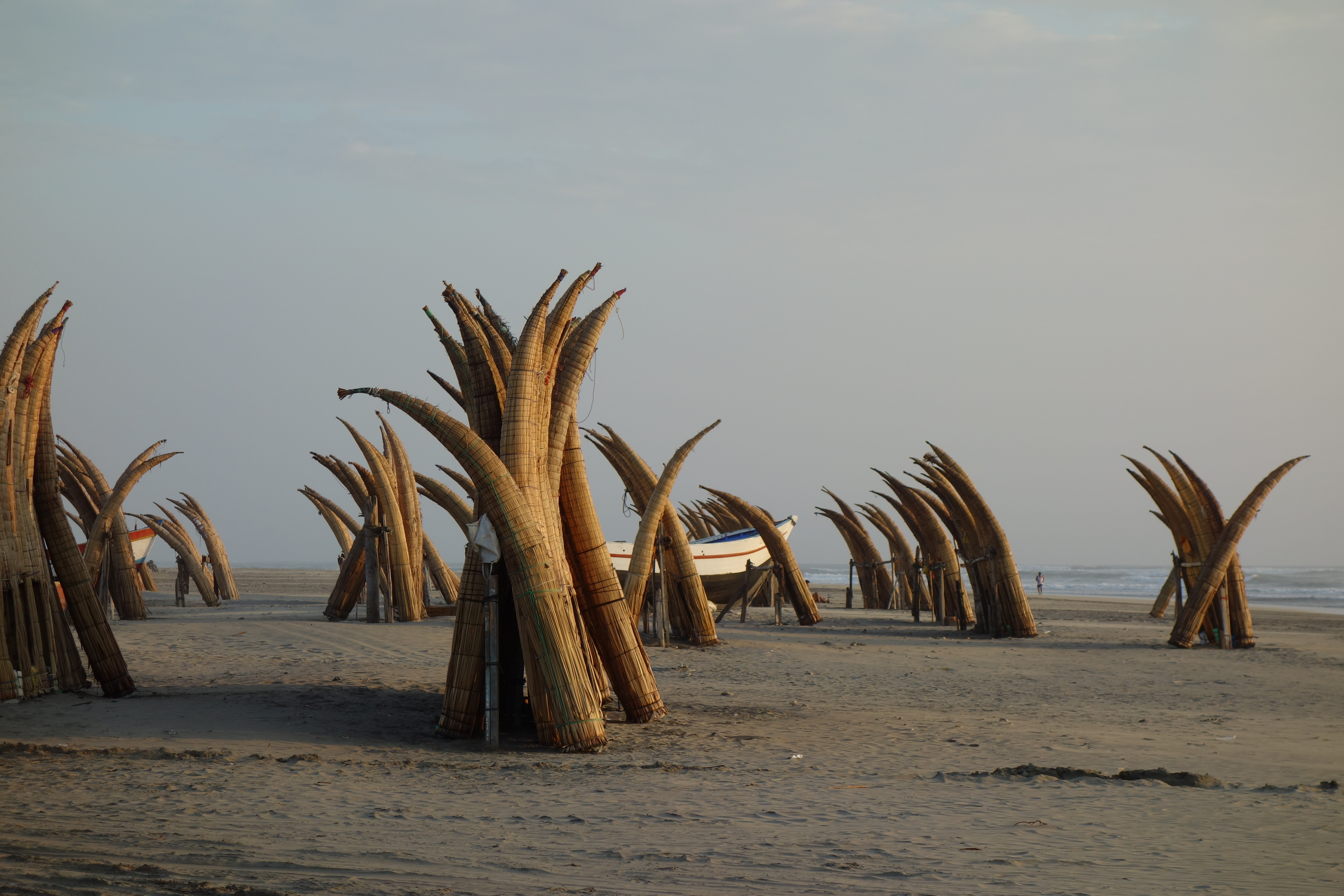 Binsenboote (span. Totoras)